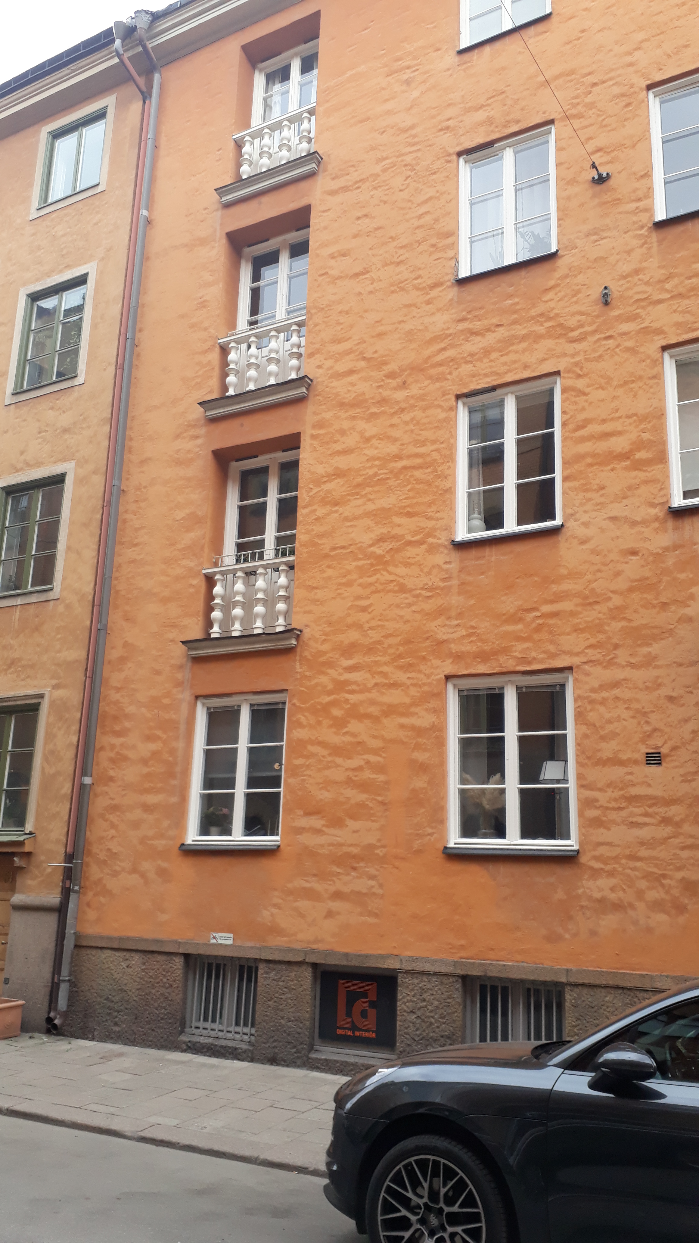 Franska balkonger på Jungfrugatan 51, Östermalm i Stockholm. I videon till Mauro Scoccos sång Sarah, syns titelrollen i ett av dessa fönster.